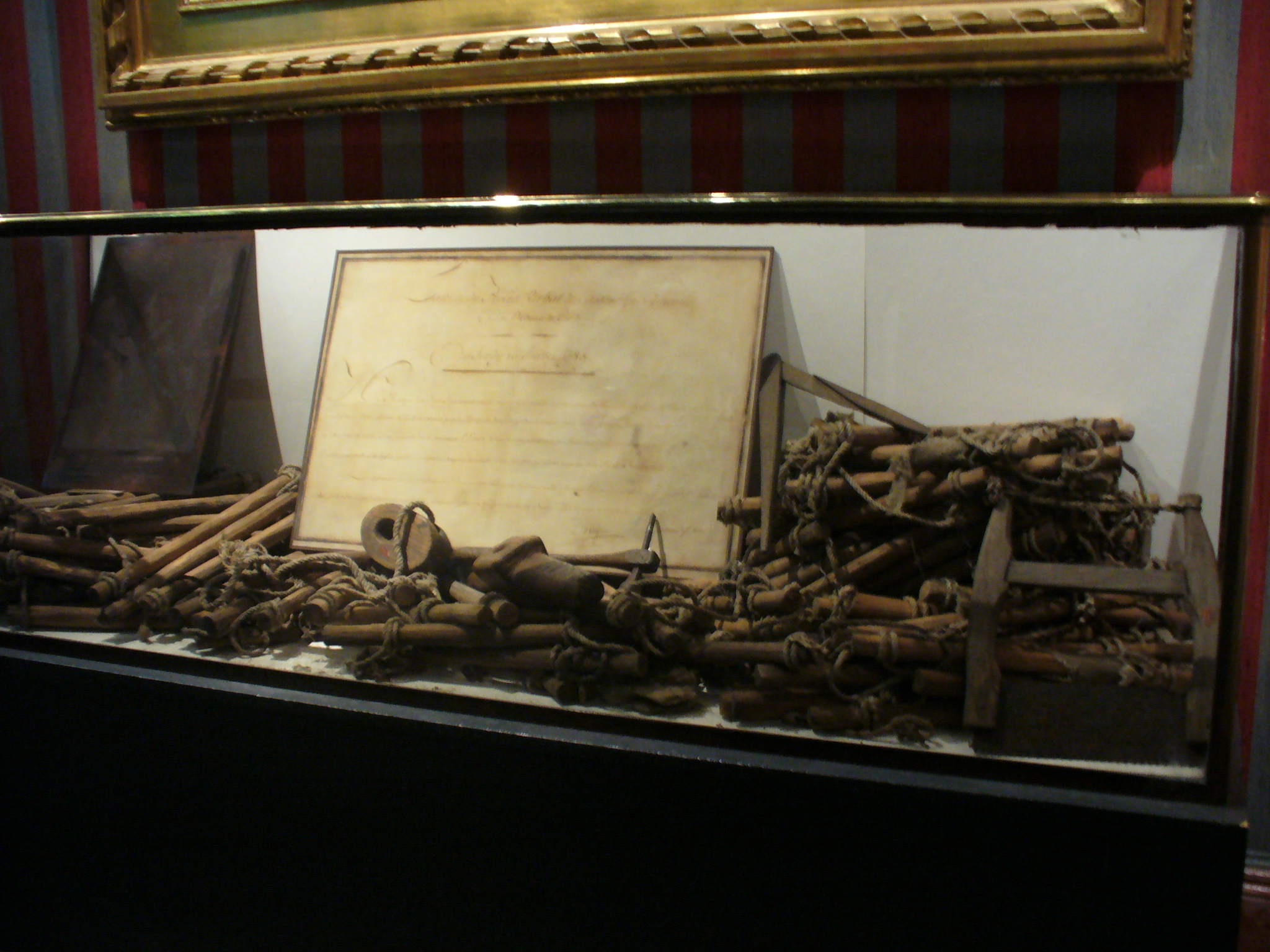 Corde de Latude qui lui a servi pour s'échapper de la Bastille. Musée Carnavalet, Paris